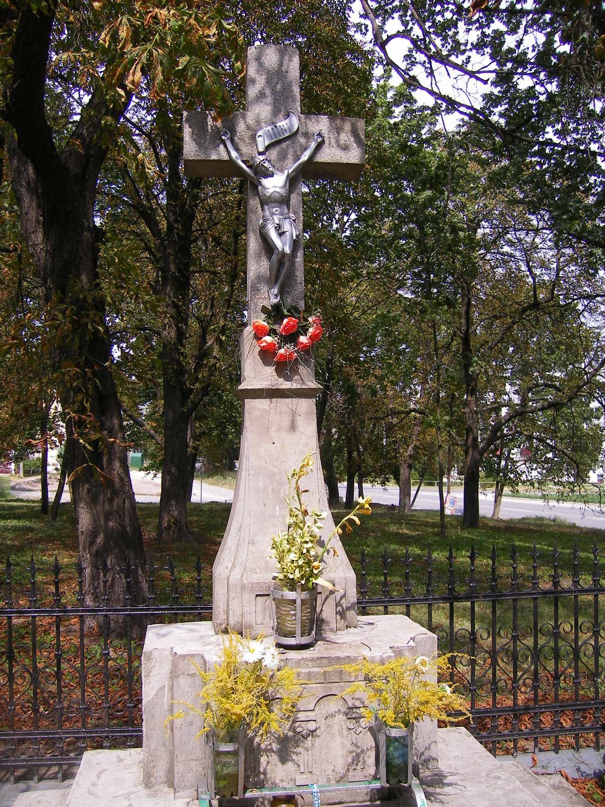 Bajcs - feszület a templom mellett